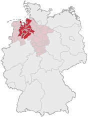 Städte und Kreise der Metropolregion Bremen/Oldenburg